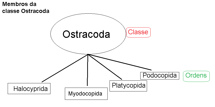 Esquema simples que mostra as ordens da classe ostracoda